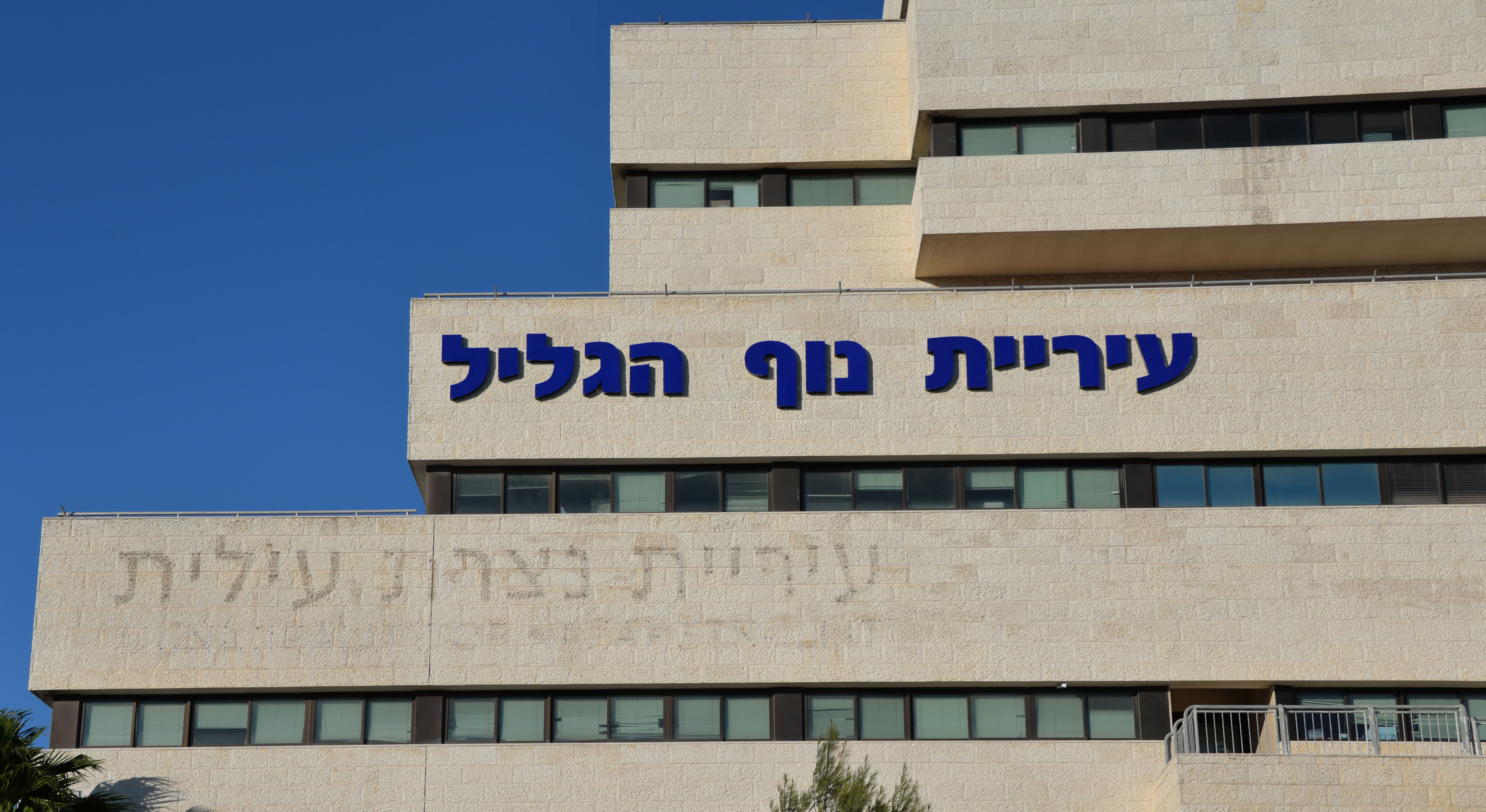 שינוי שם נצרת עילית לנוף הגליל - בניין העיריה